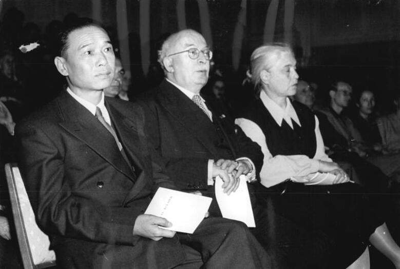 Zentralbild-Gielow 23.5.52 III.Deutscher Schriftstellerkongreß vom 22.-25. Mai 1952 in Berlin. UBz: Der chinesische Botschafter in Berlin Tschi-Peng-fei, der Präsident der Deutschen Akademie der Künste Arnold Zweig und die Schriftstellerin Anna Seghers, während der Festveranstaltung.